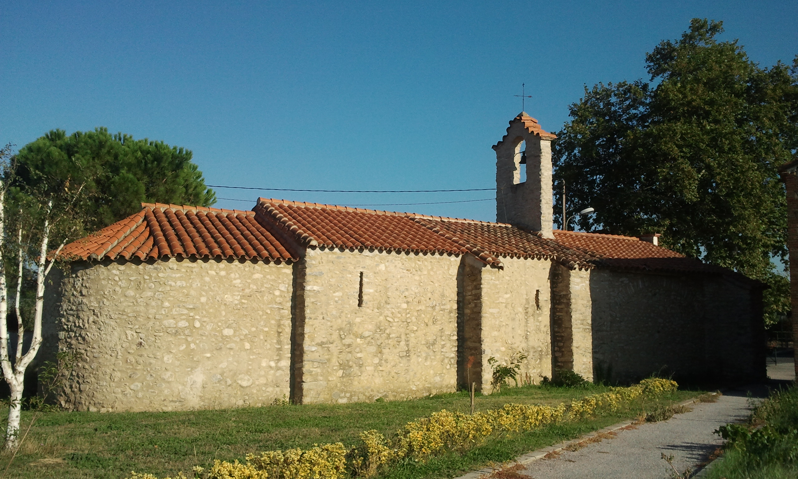 Façade sud-ouest de la chapelle Saint-Sébastien à Saint-Jean-Pla-de-Corts